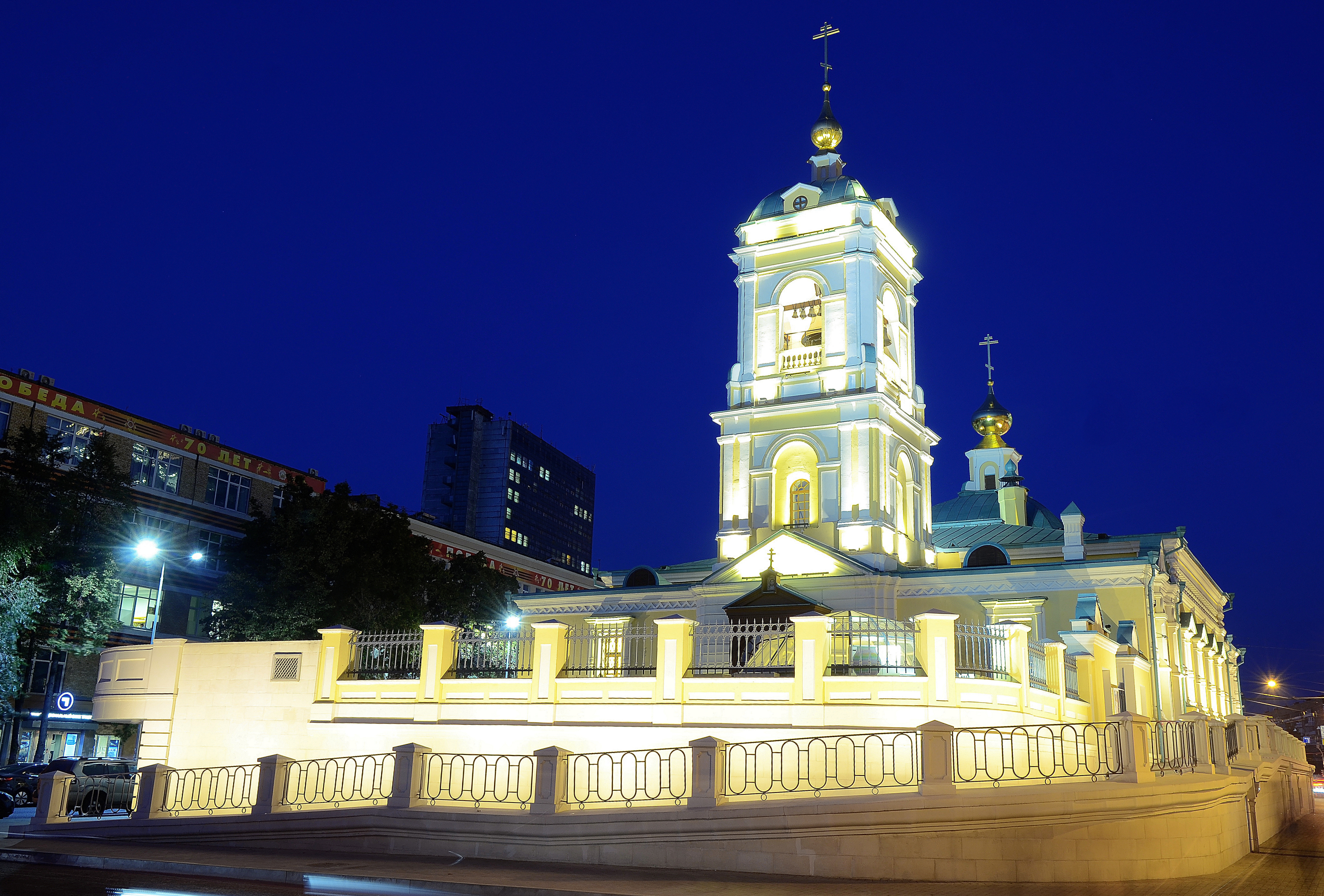 Подробнее здесь